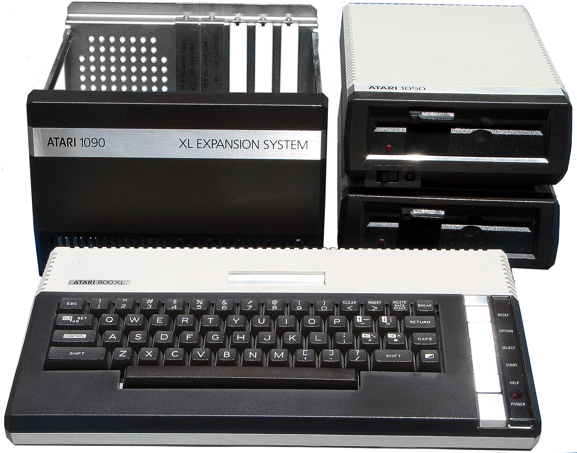 Atari 800XL mit Floppy 1050 und Erweiterungssystem 1090